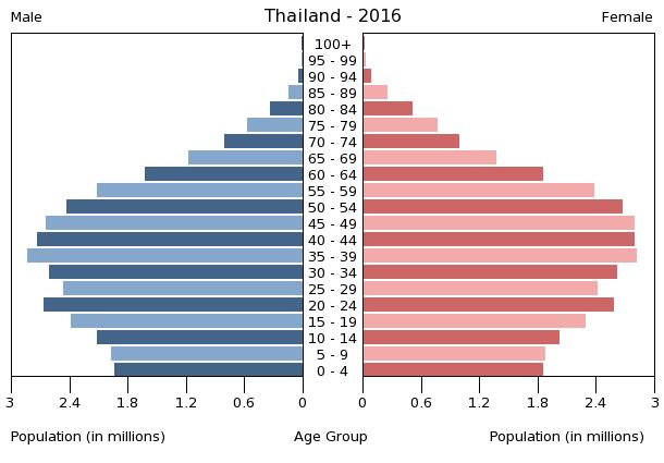 A population pyramid illustrates the age and sex structure of a country's population and may provide insights about political and social stability, as well as economic development. The population is distributed along the horizontal axis, with males shown on the left and females on the right. The male and female populations are broken down into 5-year age groups represented as horizontal bars along the vertical axis, with the youngest age groups at the bottom and the oldest at the top. The shape of the population pyramid gradually evolves over time based on fertility, mortality, and international migration trends.